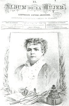 Matilde Montoya. Publicación periódica en el Álbum de la Mujer, como motivo de ser la primera médica mexicana.